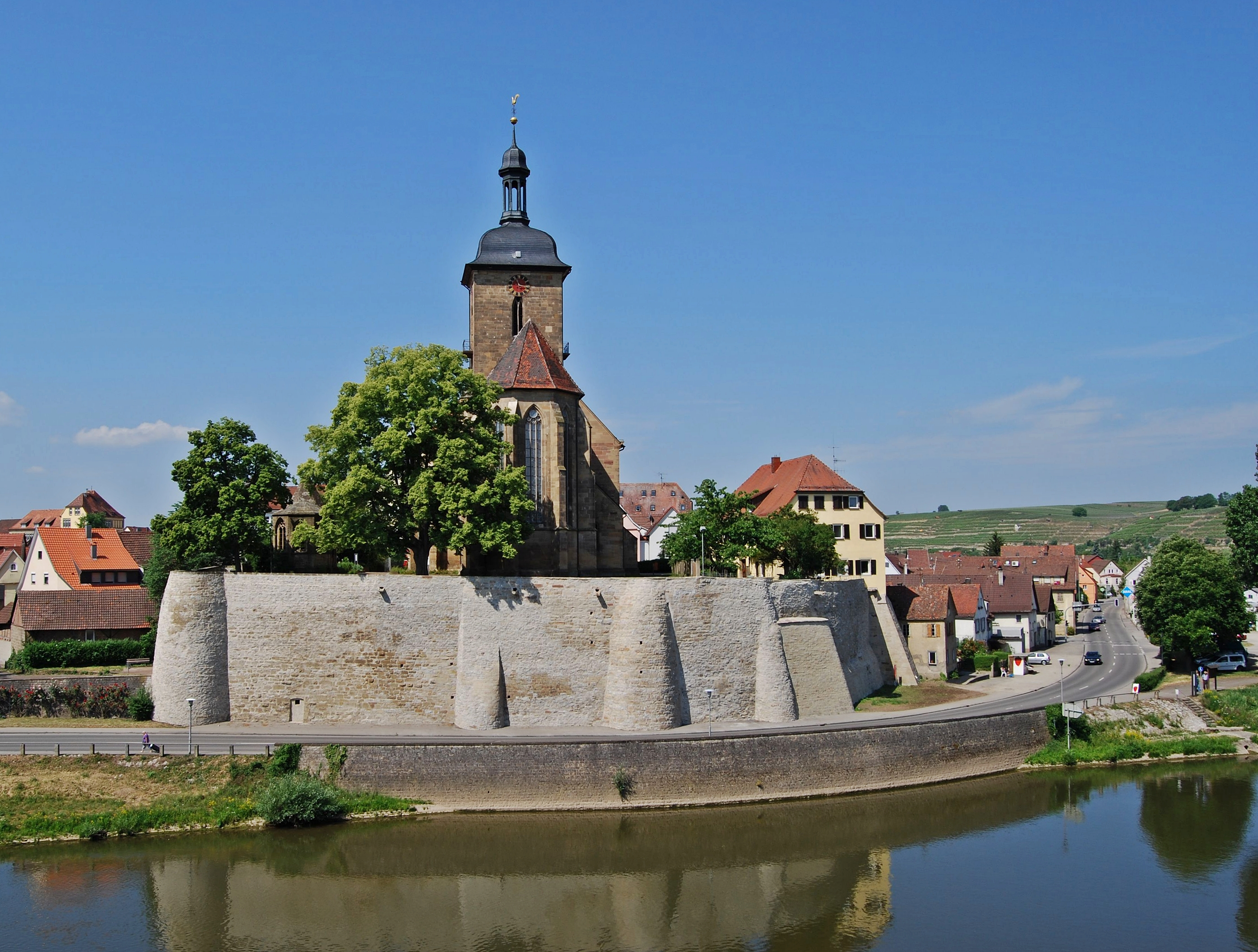 Die Regiswindiskirche in Lauffen am Neckar, aufgenommen von der Neckarinsel.